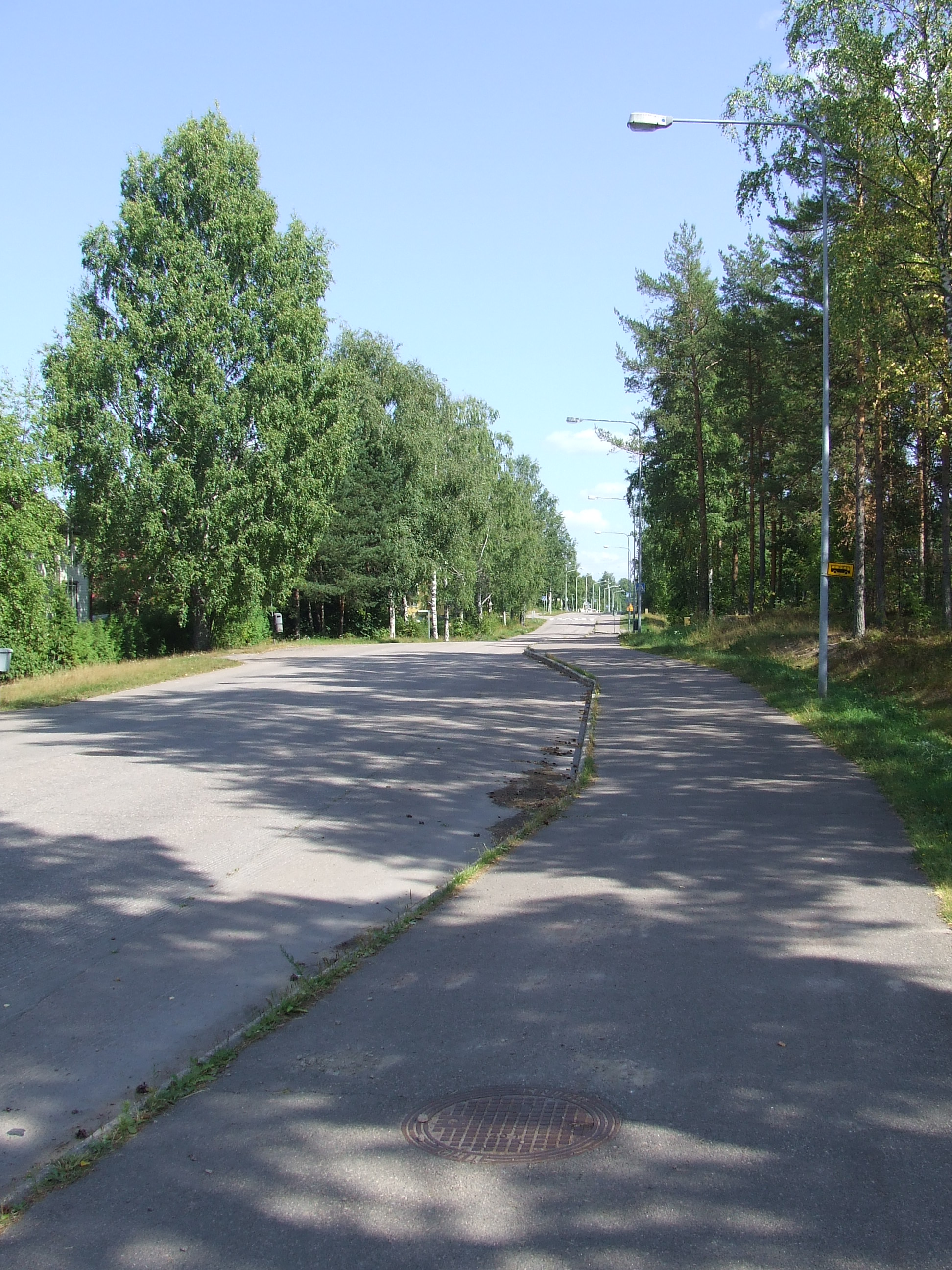 Haminan Tallinmäenkatu